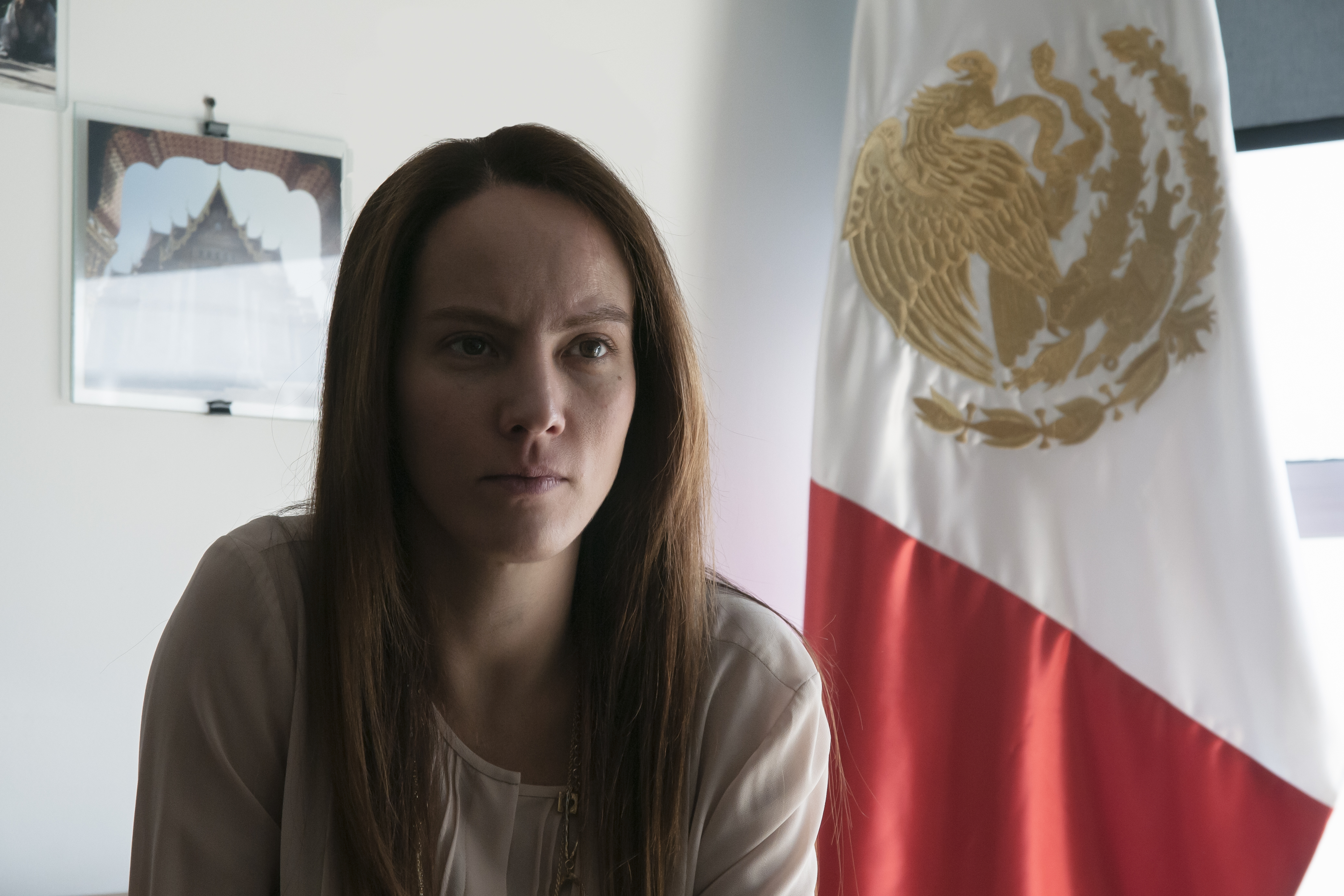 La ex asambleista, ex diputada, ex jefa delegacional, y hoy senadora Gabriela Cuevas, del PAN (partido que, según ella, "le hace falta cerrar filas y estar unidos"). Su trabajo político lo ha desempeñado en la Delegación Miguel Hidalgo, la del chapulín. Entrevista con .mx y más fotos